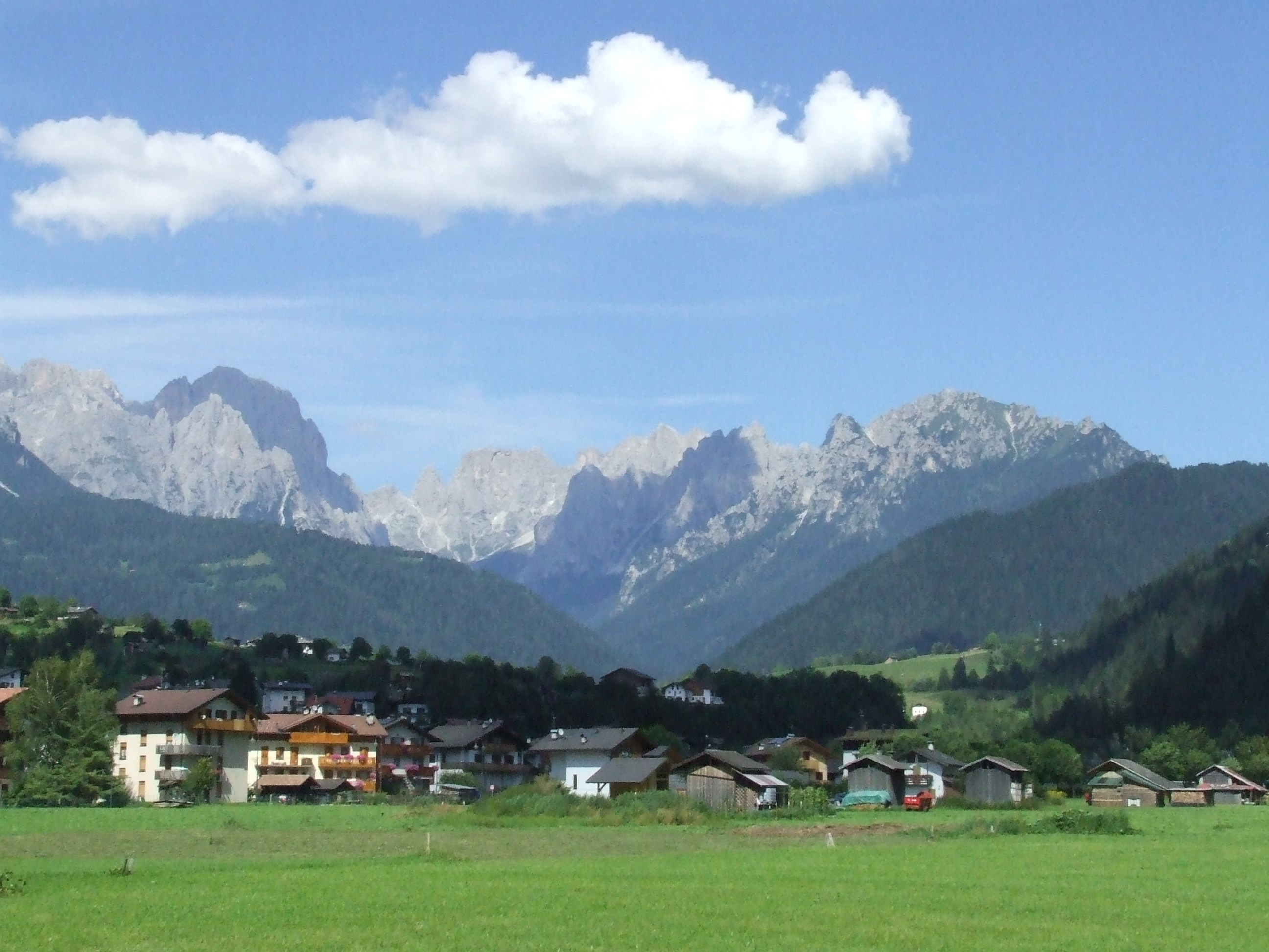 Mezzano (TN - vs. Pale di S.Martino)